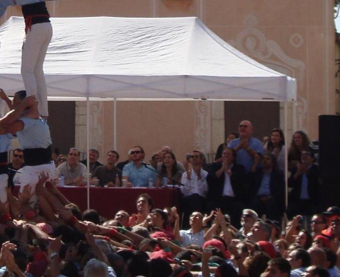 Tribuna del jurat del VIII Concurs de castells Vila de Torredembarra, celebrat el 2 d'octubre de 2011.